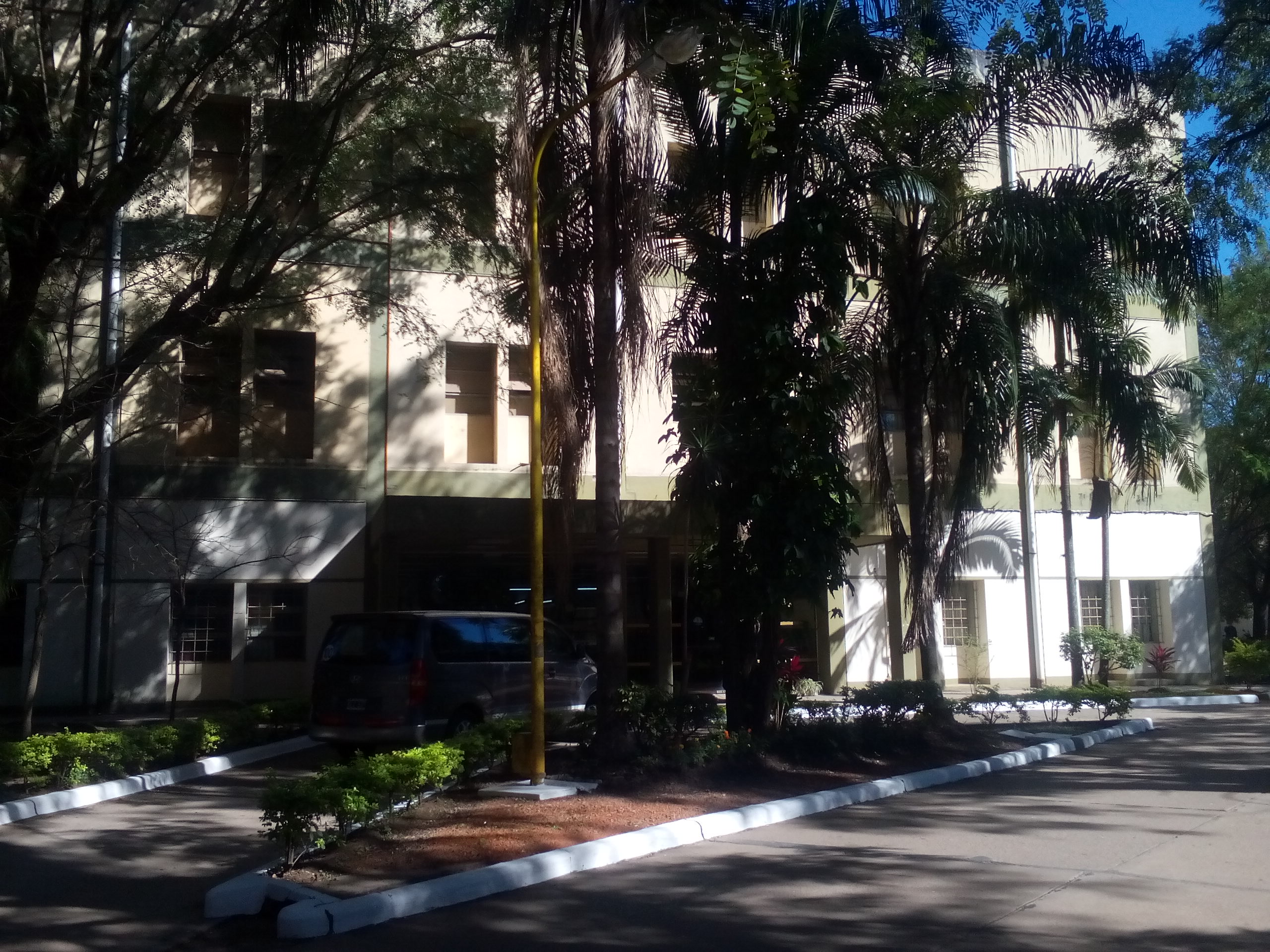 Fotografía del frente del edificio de la Facultad de Ciencias Económicas